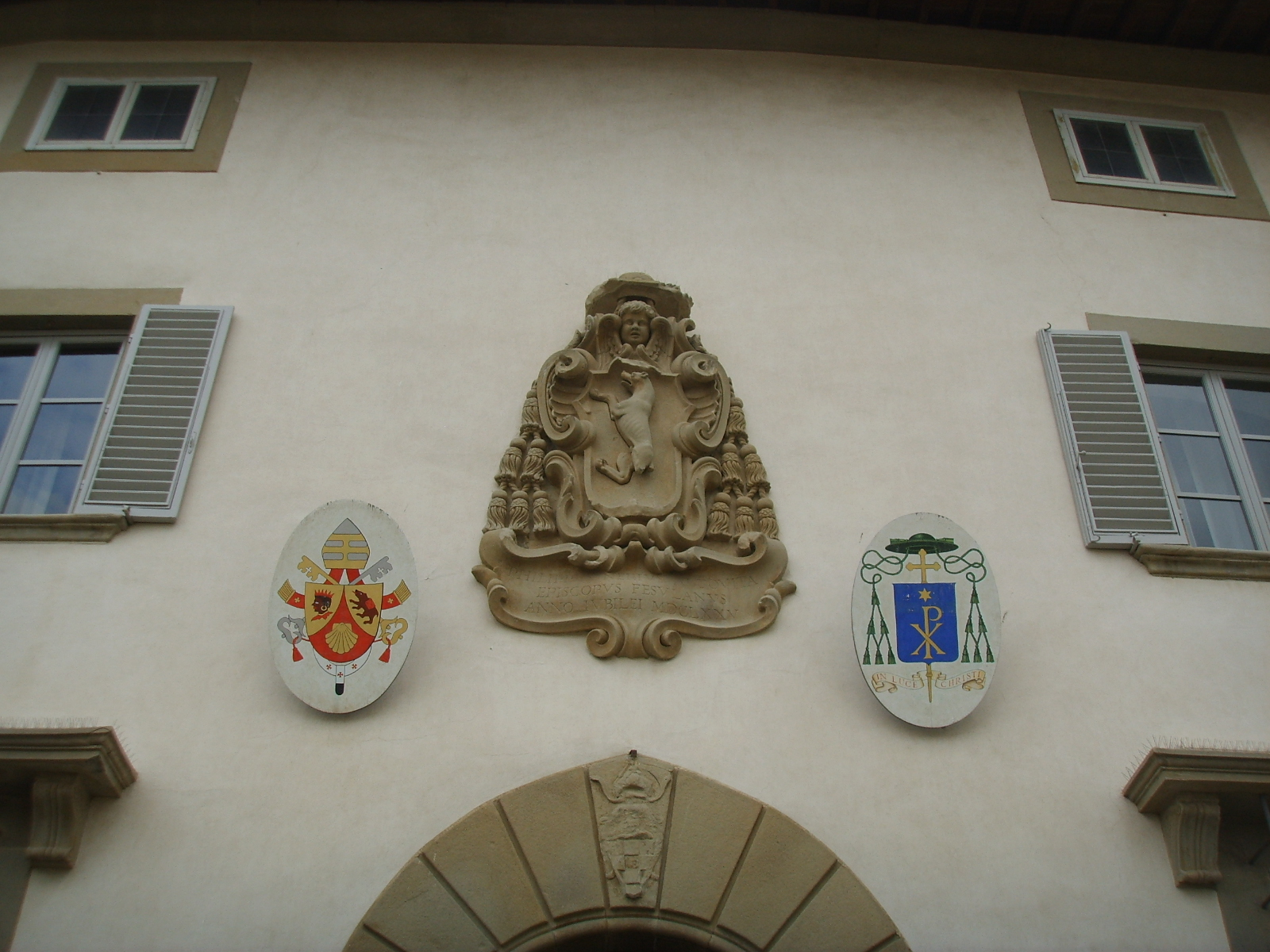 Fiesole, palazzo vescovile, stemma altoviti, benedetto XVI e vescovo Luciano Giovannetti